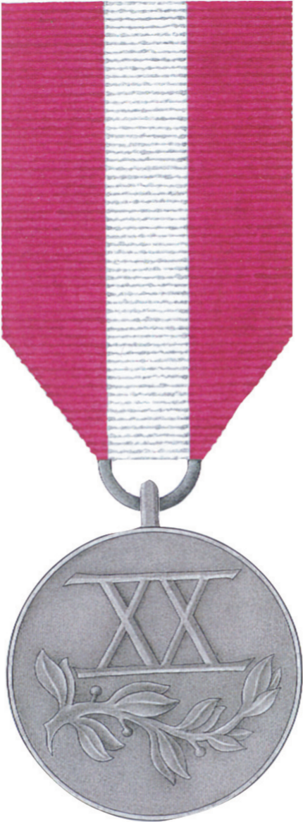 Srebrny Medal Za Długoletnią Służbę. Rewers.